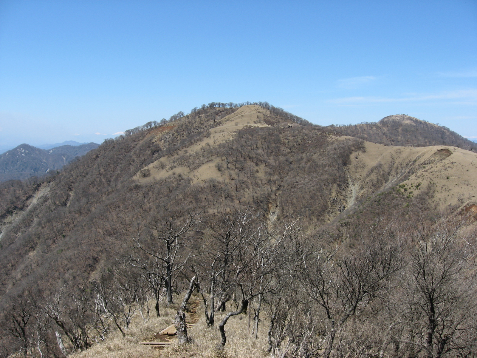 丹沢山付近より不動ノ峰